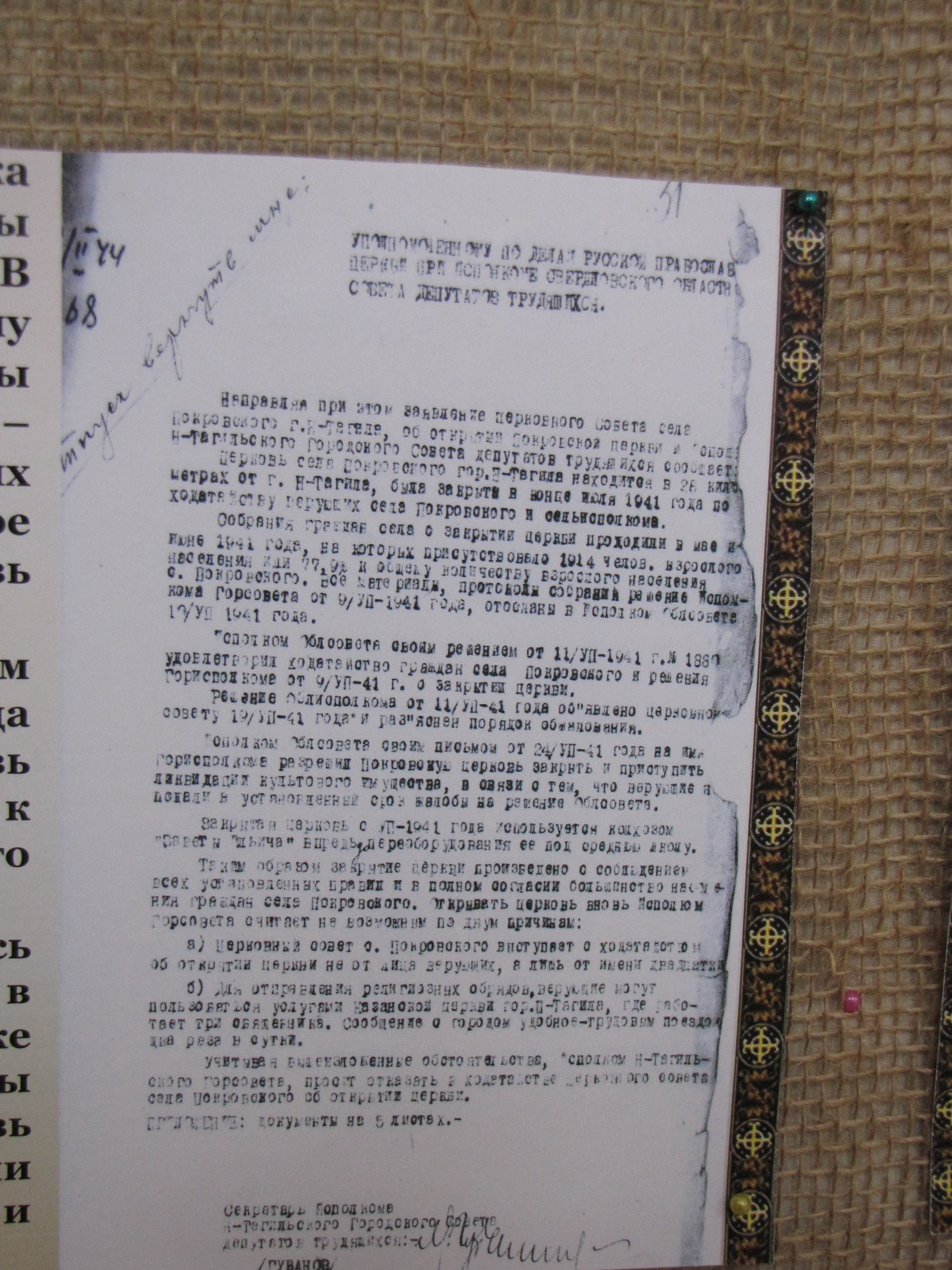 Ответ на запрос Уполномоченного по делам Русской Православной Церкви при Исполкоме Свердловского областного совета депутатов трудящихся